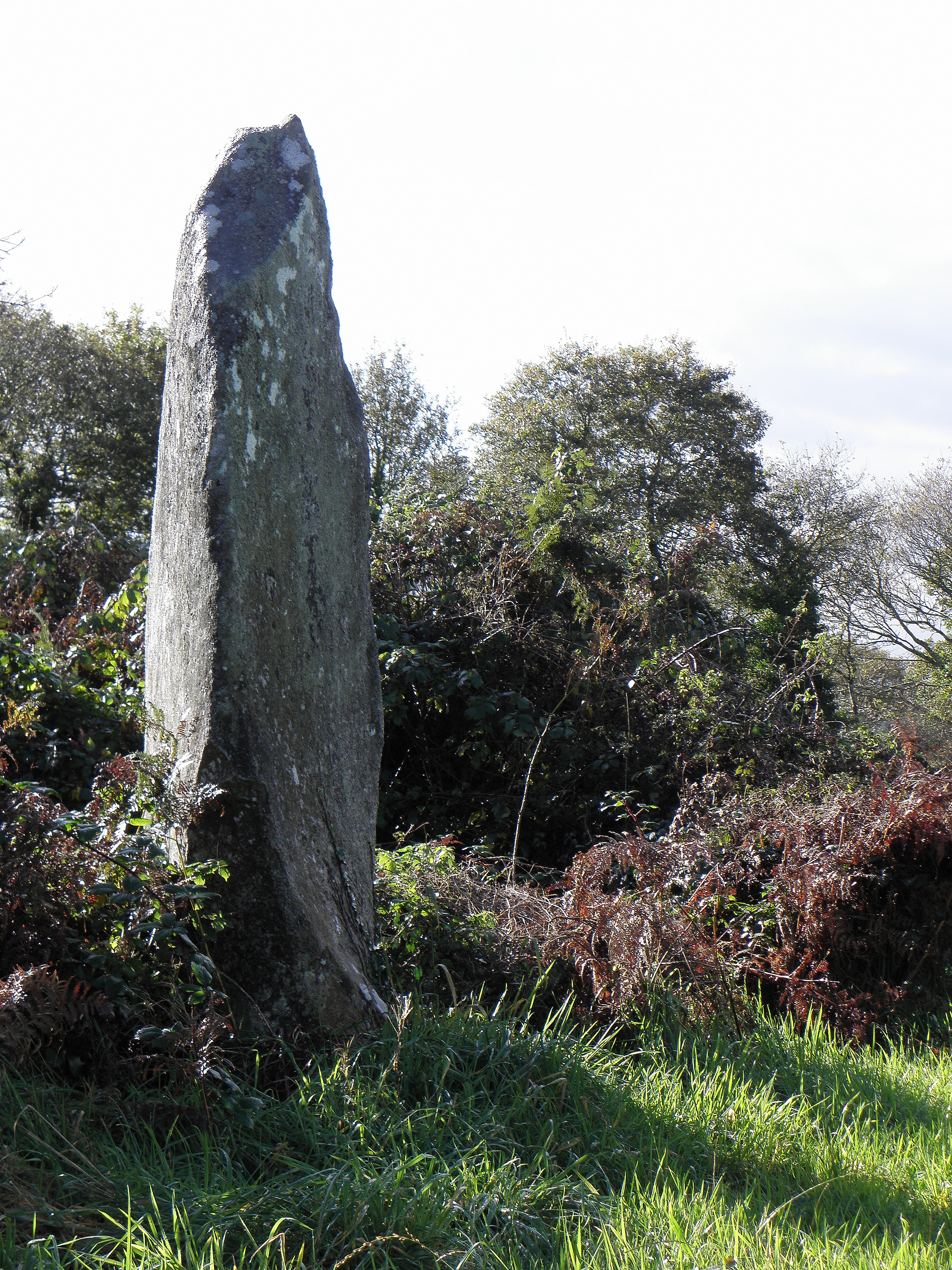 Unique menhir dressé des cinq de l'alignement de Leïtan en Brennilis (29).